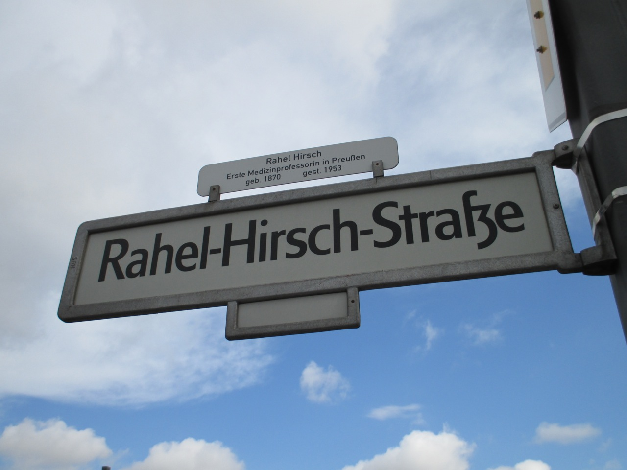 Berliner Straßenschild der Rahel-Hirsch-Straße in Berlin-Moabit mit Widmung